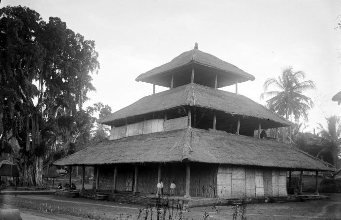 Negatief. Gebouw voor hanengevechten in Gianjar